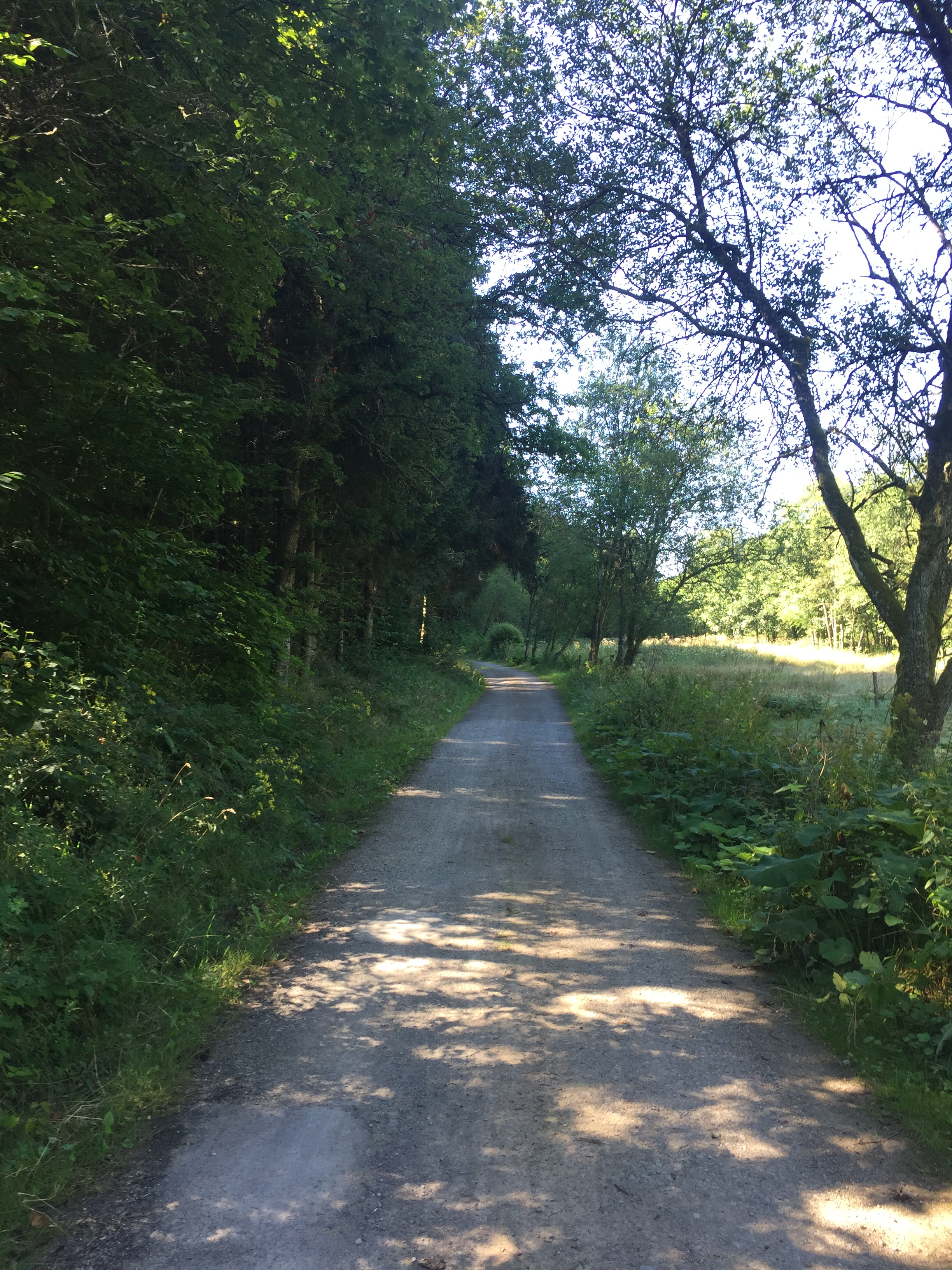 El camino de Matías entre Hellenthal y Udenbreth.